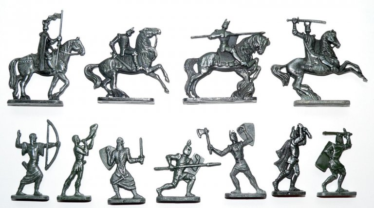 «Воины средневековья». Силумин. Автор пресс-форм скульптор Борис Дмитриевич Савельев. Астрецовская фабрика металлических игрушек (Москов. обл). 1972 г.